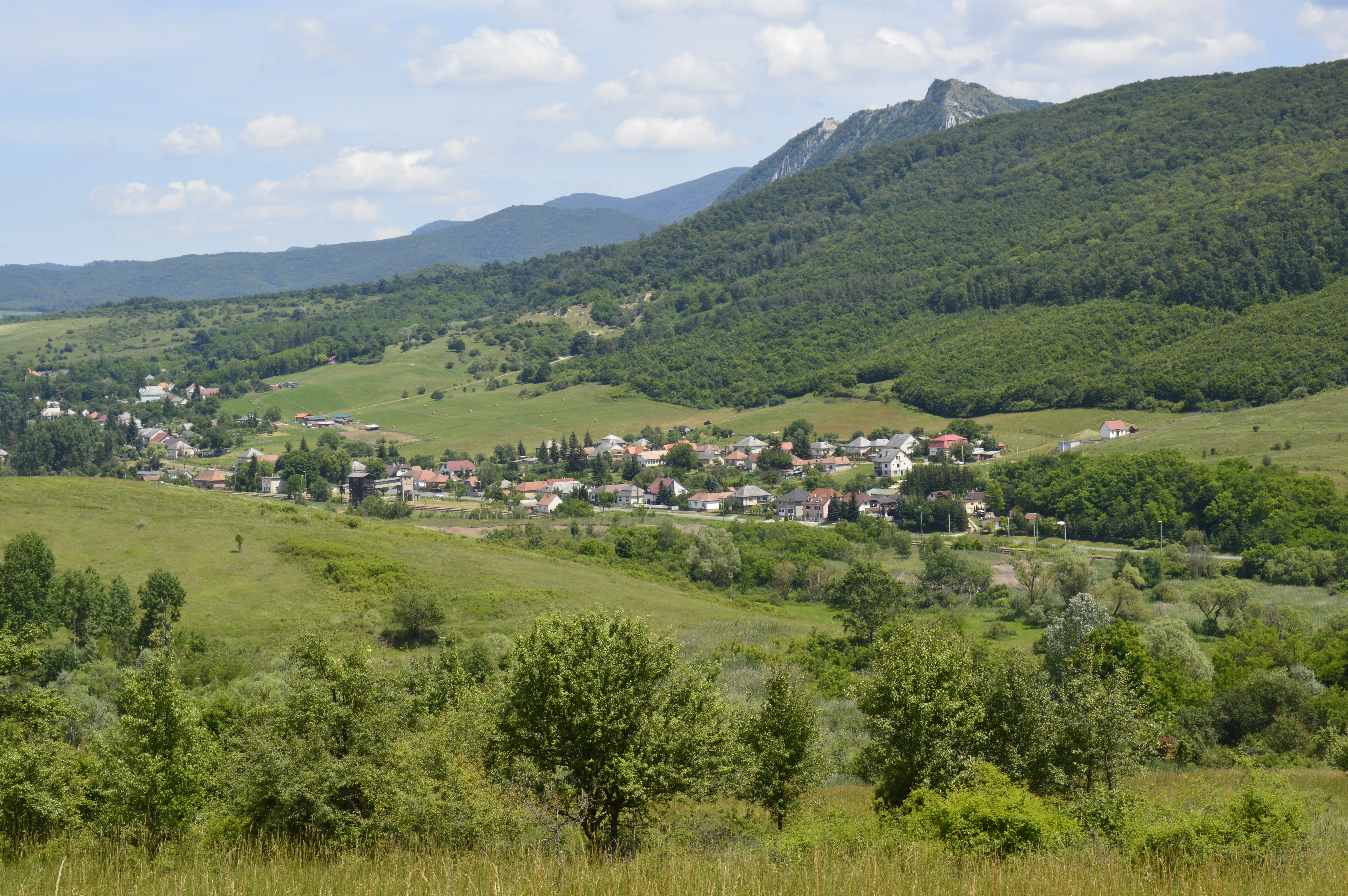 Mónosbél